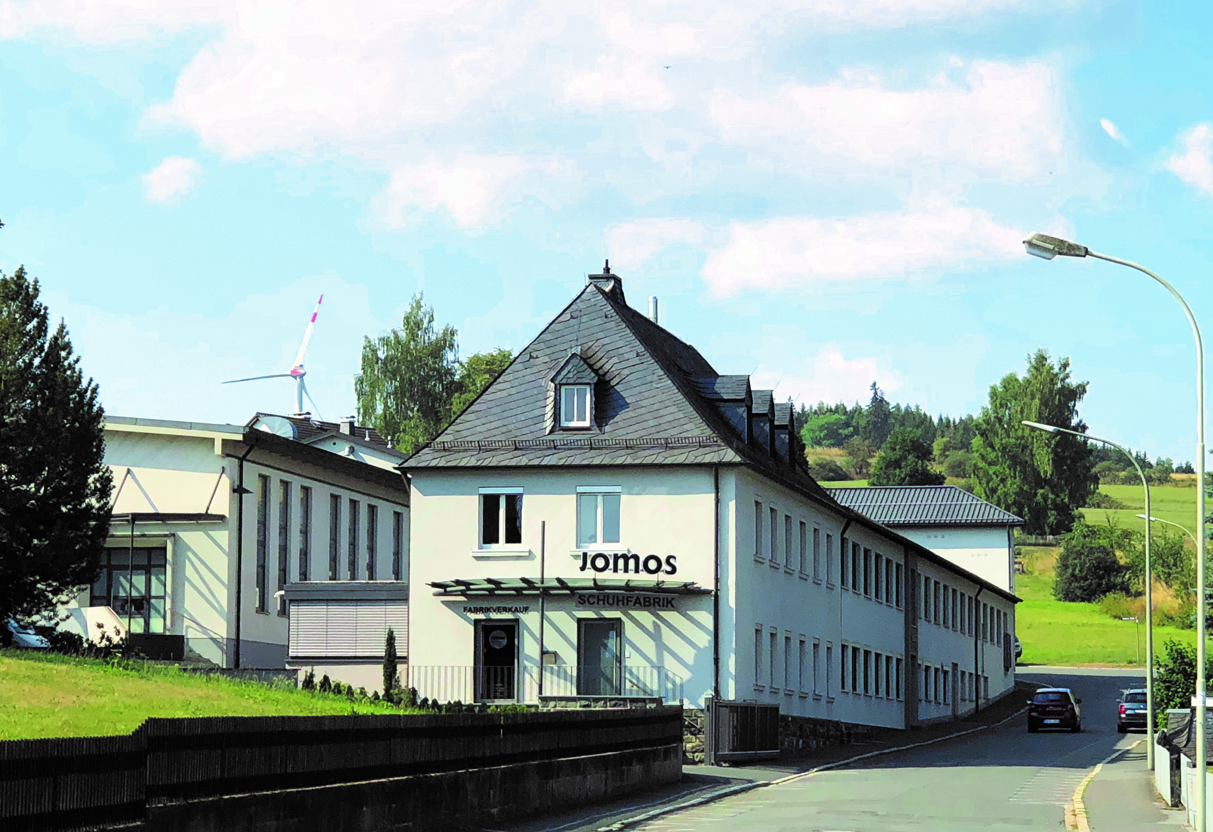 Außenansicht der Schuhfabrik JOMOS in Selbitz aus dem Jahr 2018.